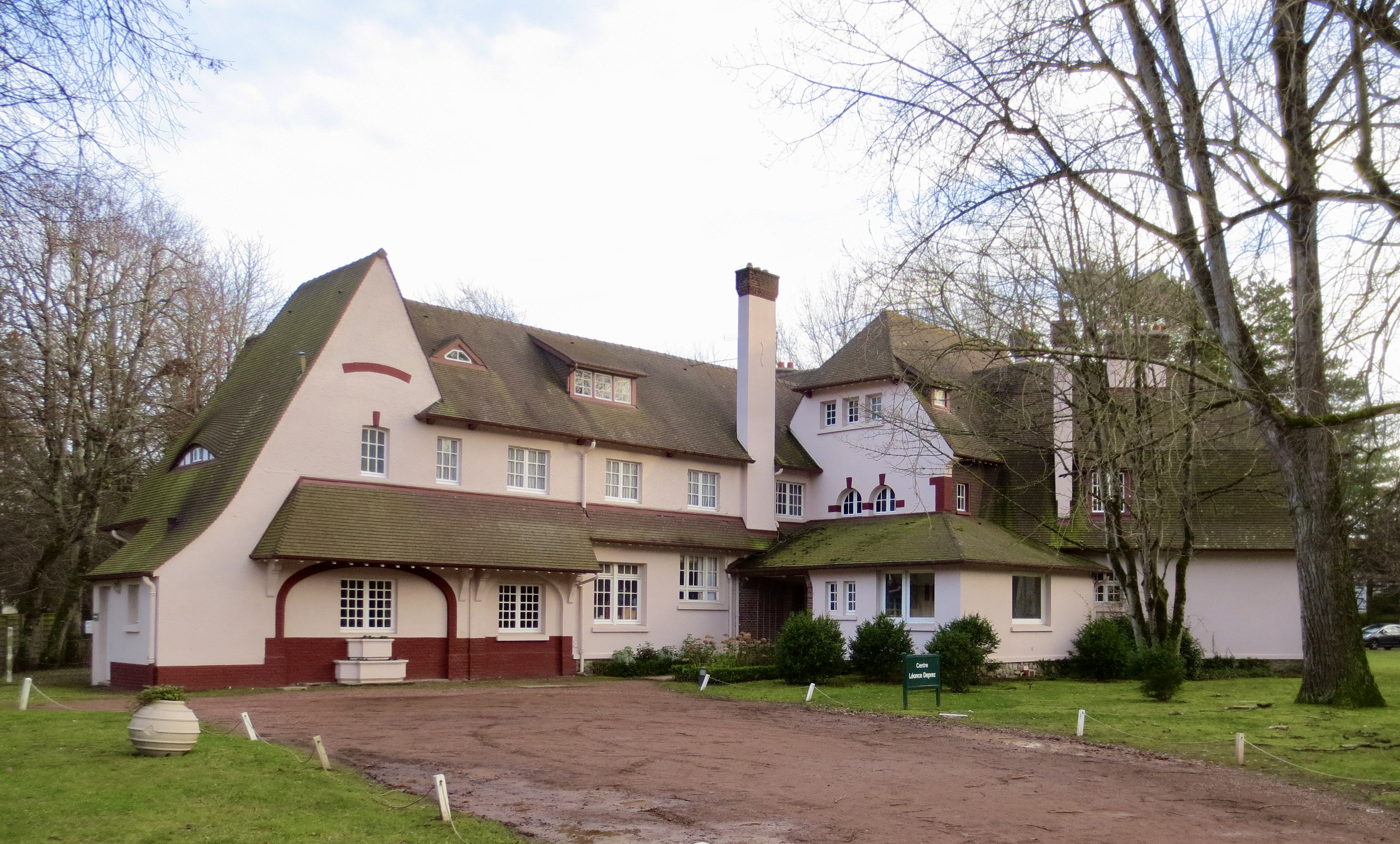 2019 - Le Touquet-Paris-Plage - Centre Léonce Deprez, 207, avenue du Général-de-Gaulle.